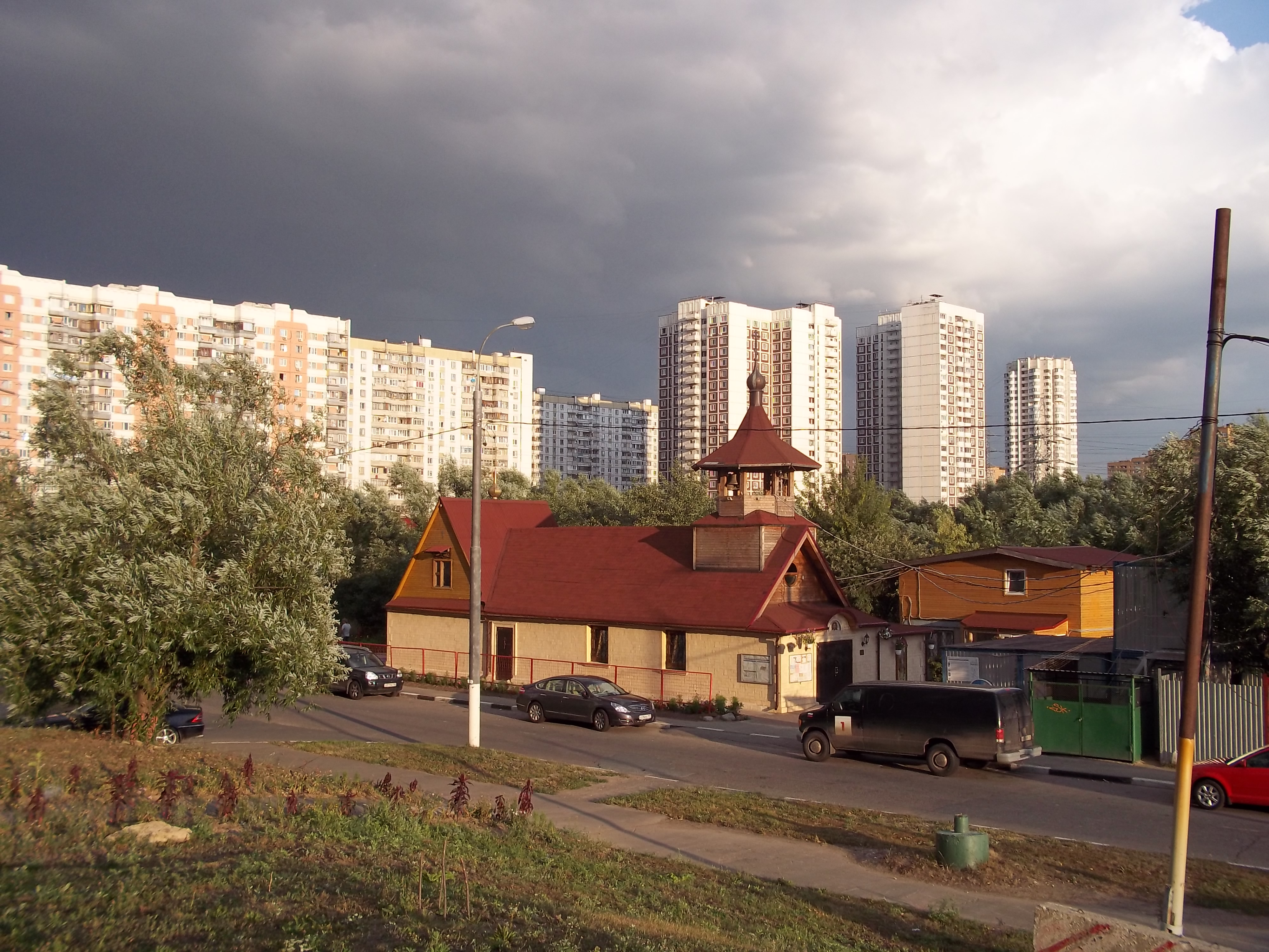 Церковь апостола Фомы в московском районе Москворечье-Сабурово